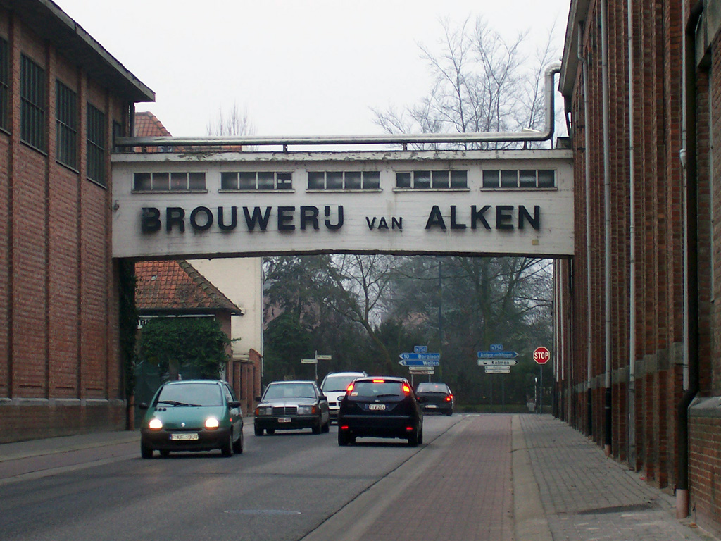 Foto van een deel van de Brouwerij te Alken (België), waar oa. het pilsbier Cristal Alken gebrouwen wordt. Foto is van eigen hand en mag vrij verspreid worden.